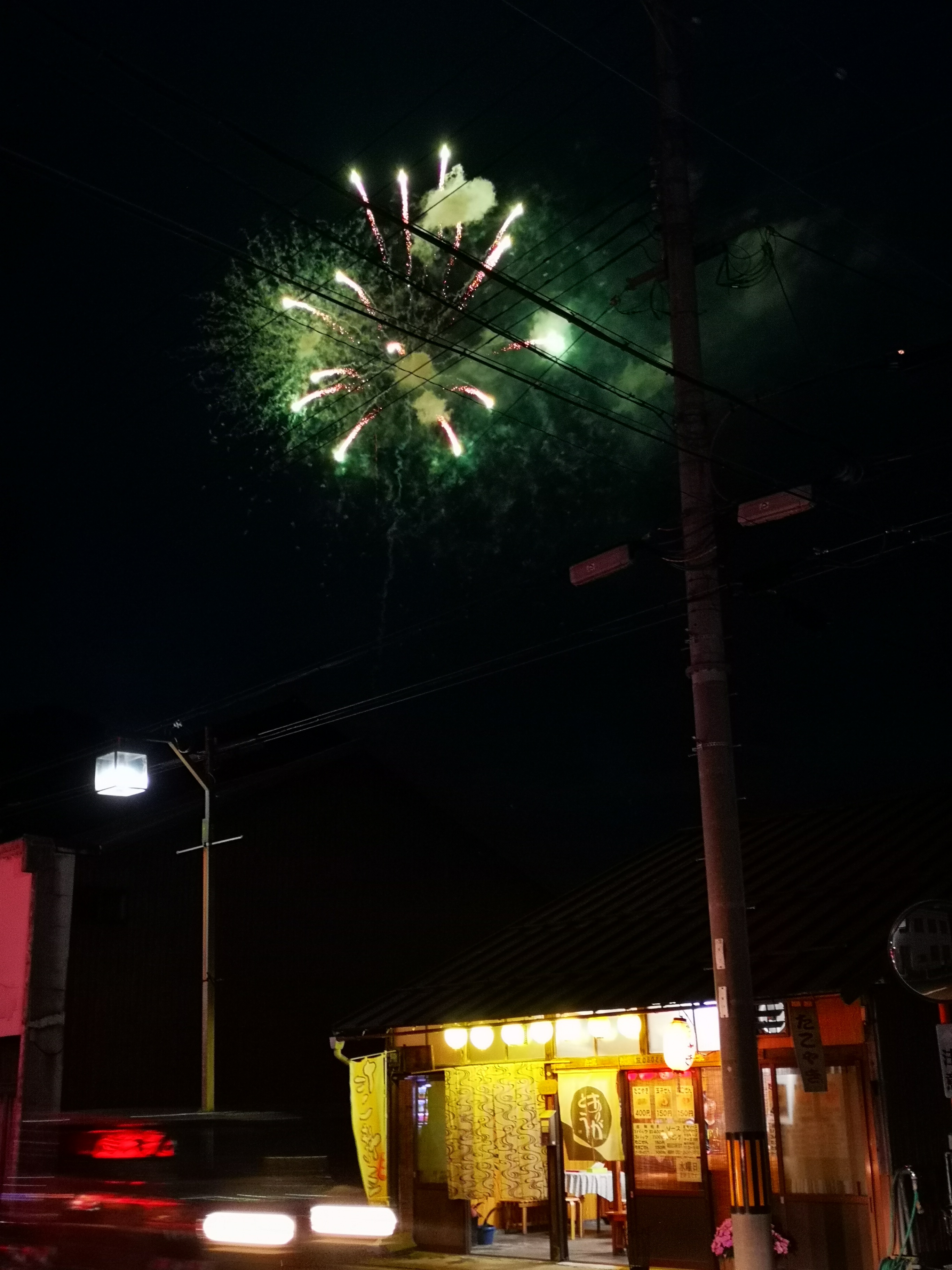 京都府京丹後市峰山の金刀比羅神社、夏の例祭当日の地域。「京丹後おかみさんの会」による丹後縮緬ののれんが町内の各所に掲げられ、花火があがる。